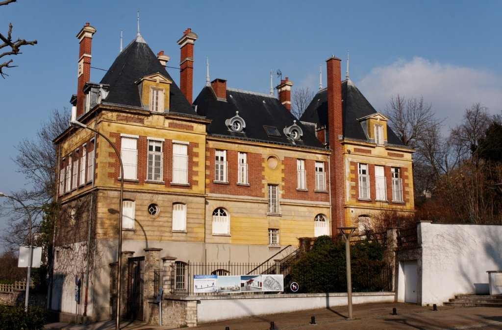 Maison de Louis Daguerre, où il vécut de 1839 à 1851 - Bry-sur-Marne